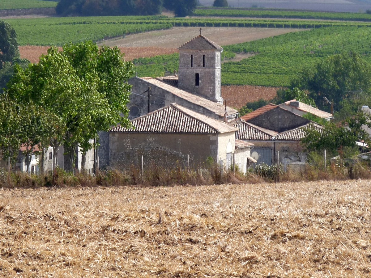 Vue de St-Georges-des-Agoûts, Charente-Maritime, France